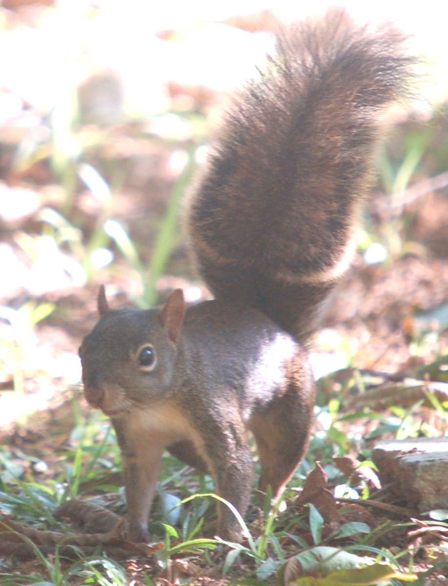 Sciurus aestuans, Esquilo Brasileiro